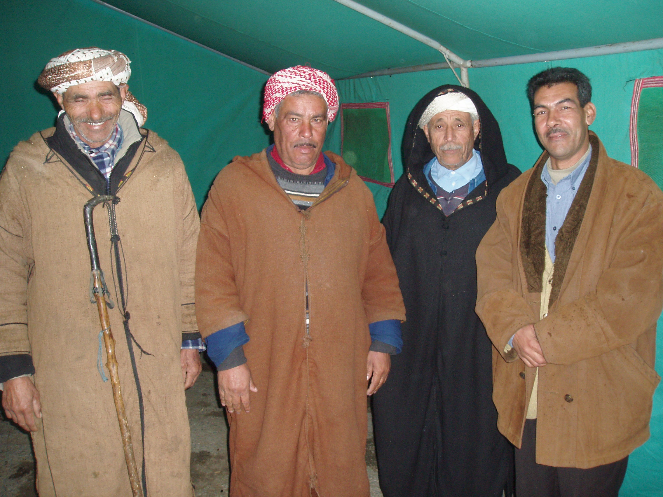 Nord afrique This is an image of Cultural Fashion or Adornment from Algeria